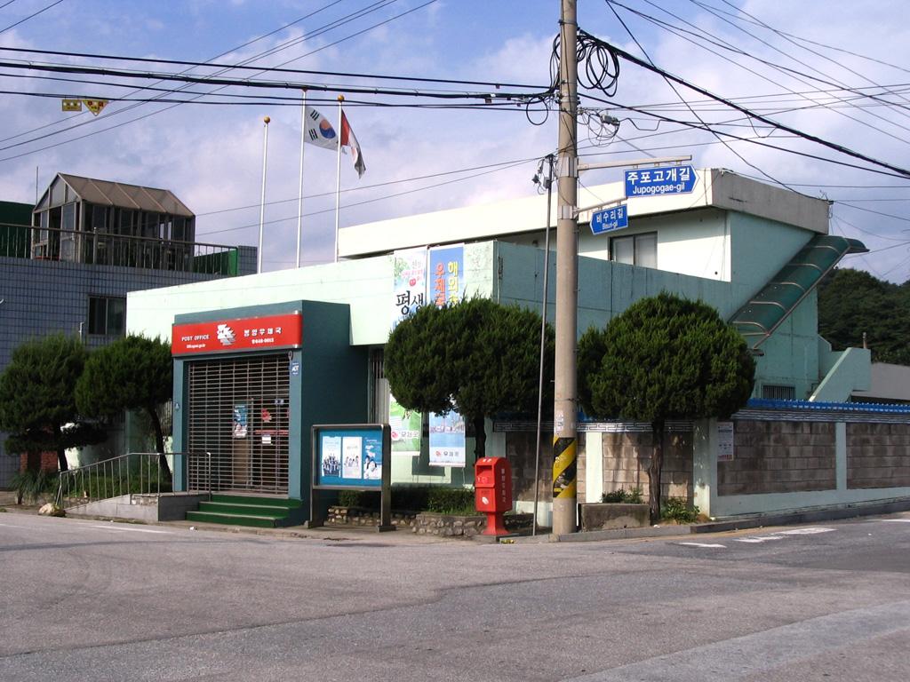 충청북도 제천시에 있는 봉양우체국